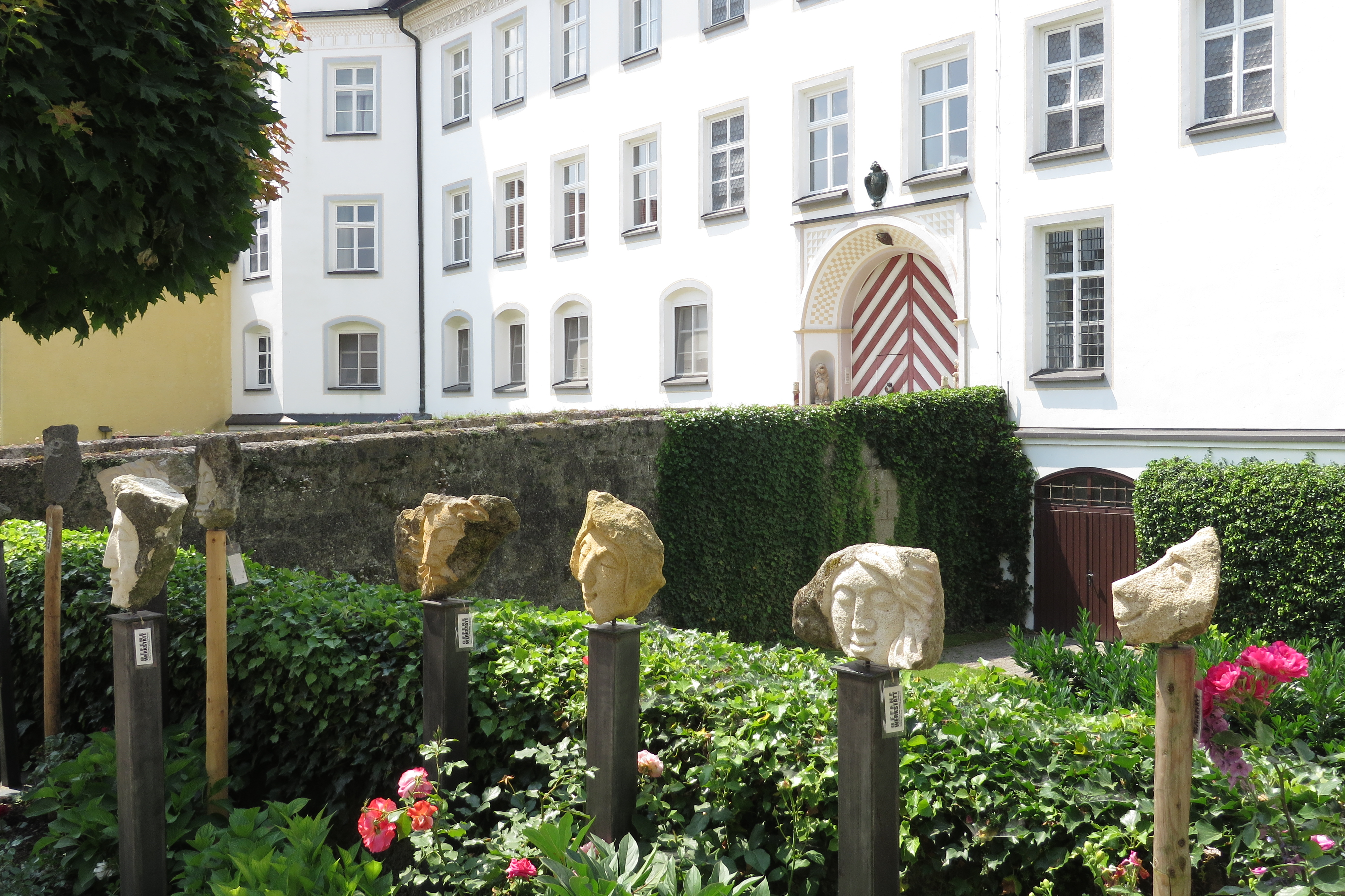 Gartentage auf Schloss Tüßling vom 5.–7. Juli 2013